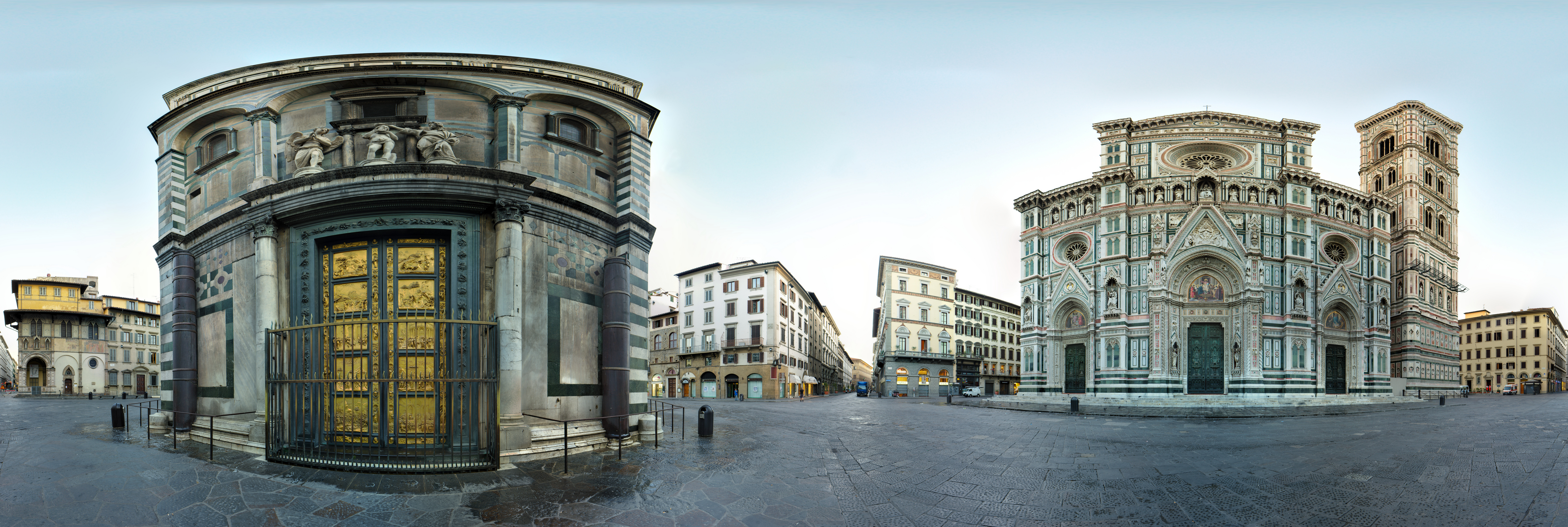 Santa Maria del Fiore (Florence) and Batisterium in 360° view